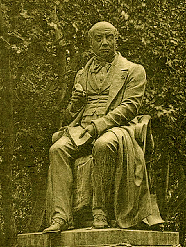 Adrien de Gasparin, bronze de Pierre Hébert (1804-1869), fondu par les occupants en 1942, d'après une carte postale de l'éditeur Louis Lévy ayant circulé en 1924